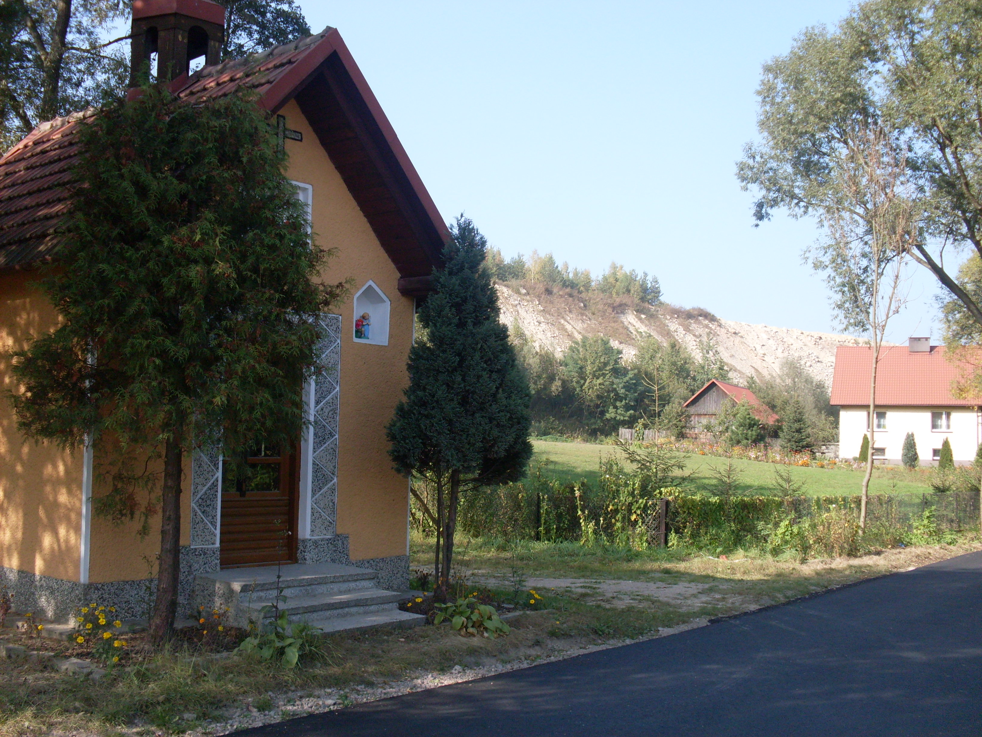 Kapliczka we Frywałdzie,gdzie dawniej chrzczono dorosłych i dzieci